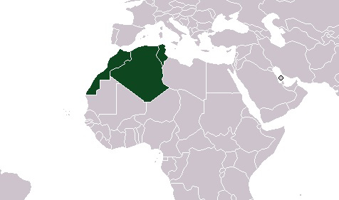 Die Maghreb-Staaten im engeren Sinne